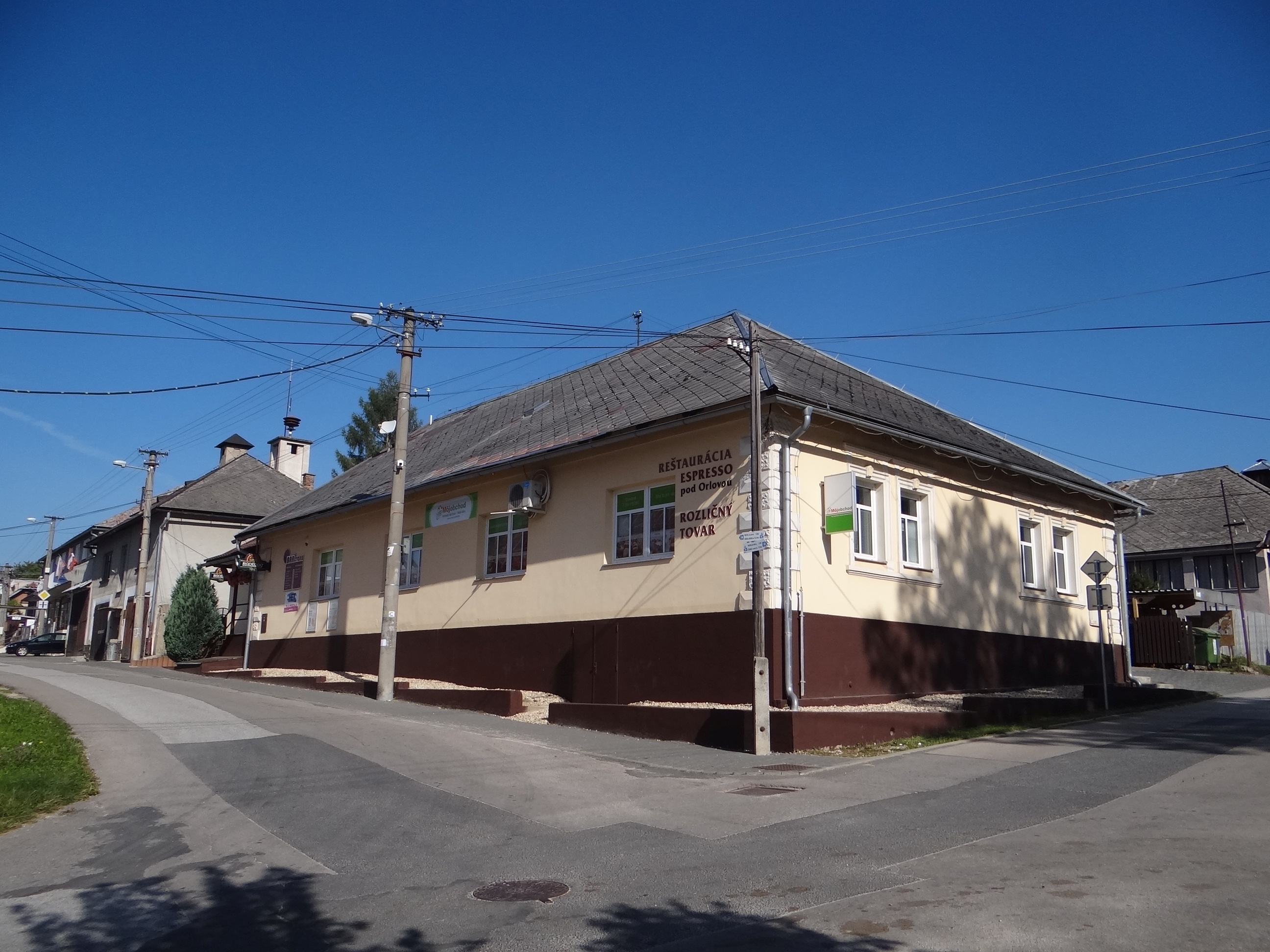 Pohorelá